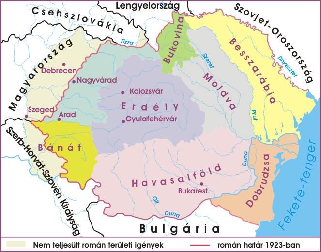 Nagy-Románia kialakulása 1920-1923 – térkép